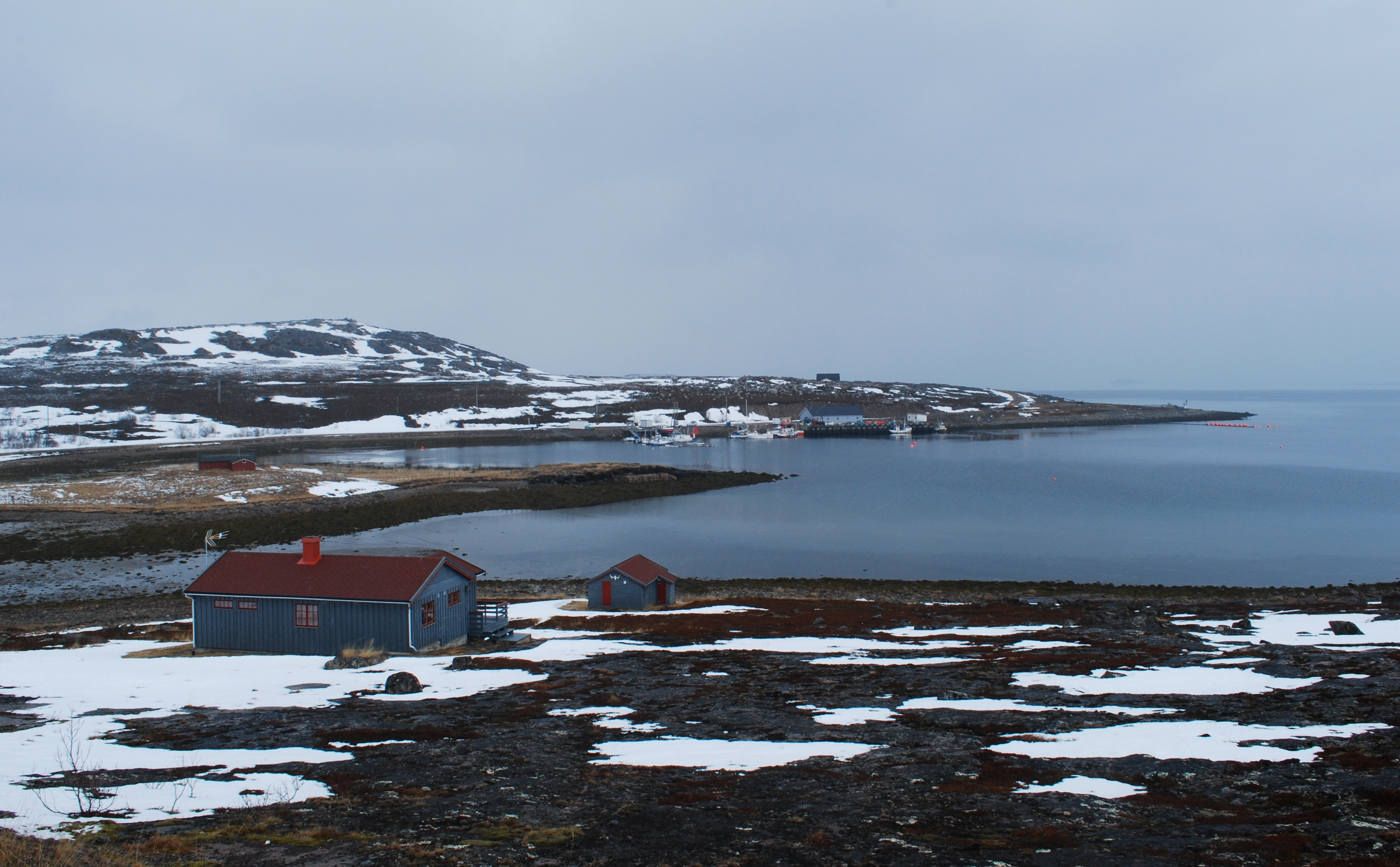 Torhop (samisk Gohppi), Vestertana, Tana kommune, Finnmark